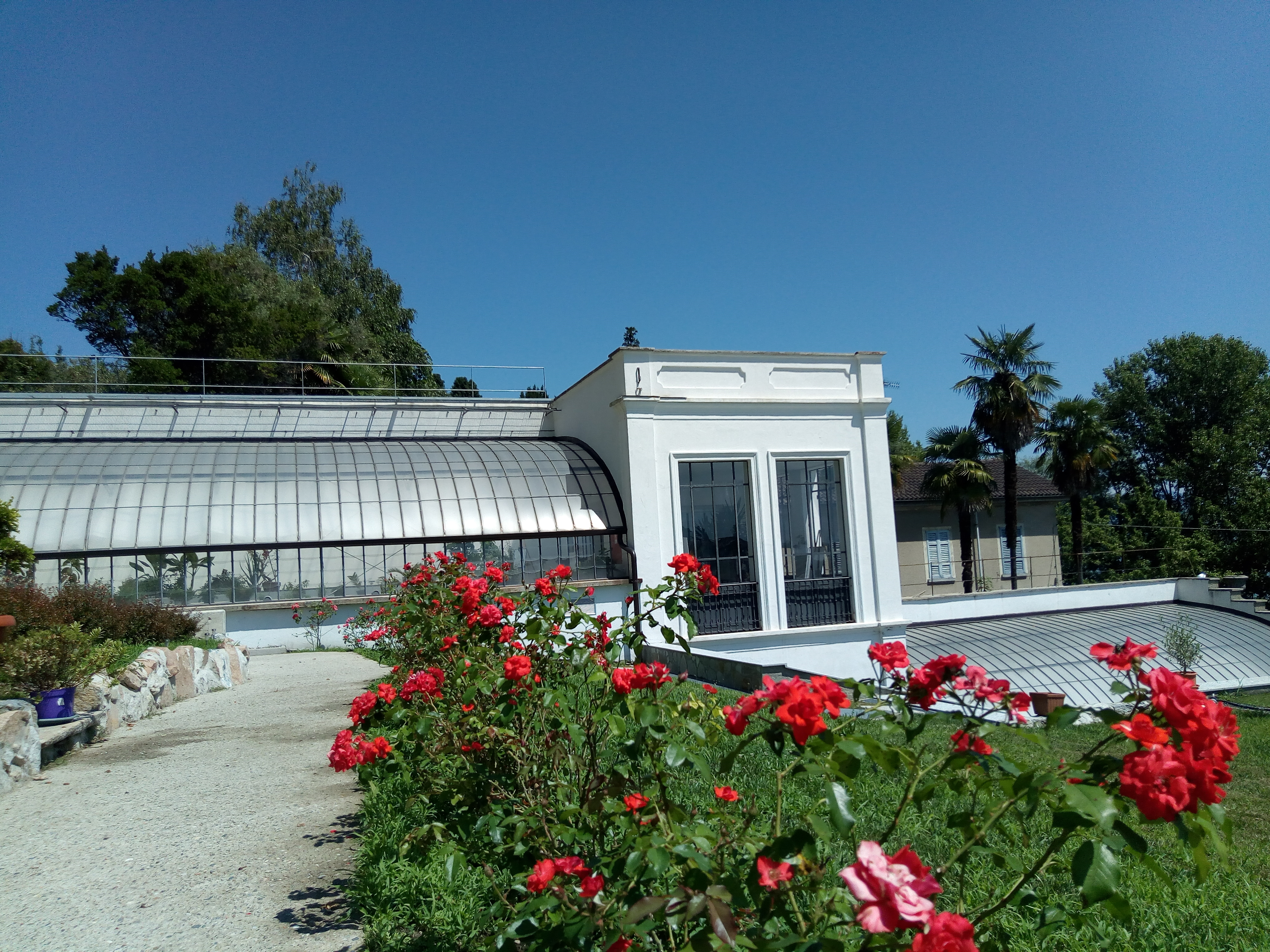 Le Serre recuperate da Fondazione UniversiCà nel 2018